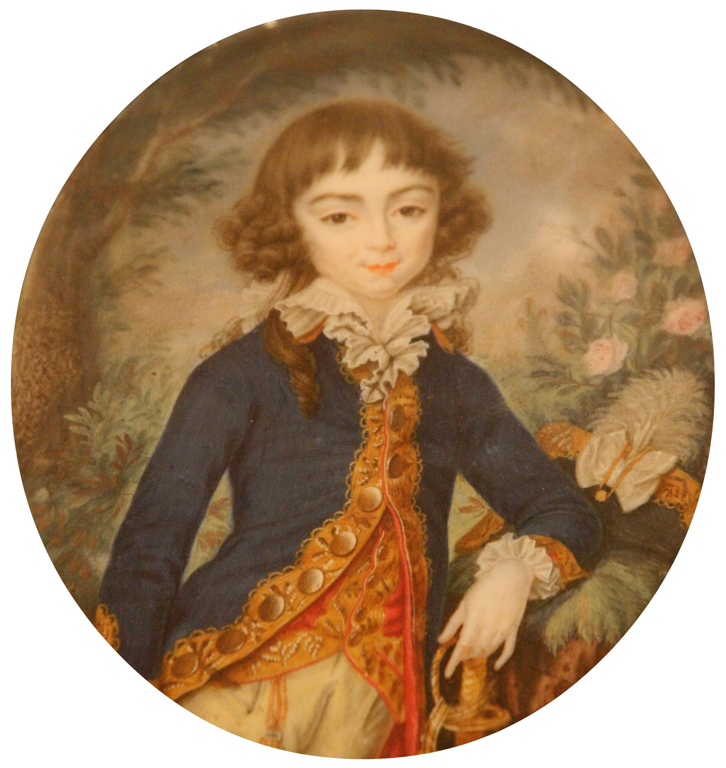 Александр Иванович Рибопьер (1781-1865)